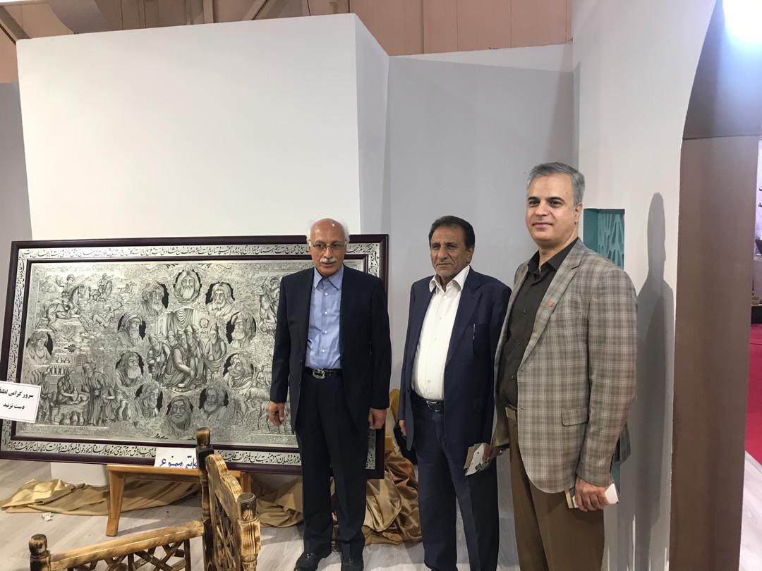 حضور جناب جهانگیری